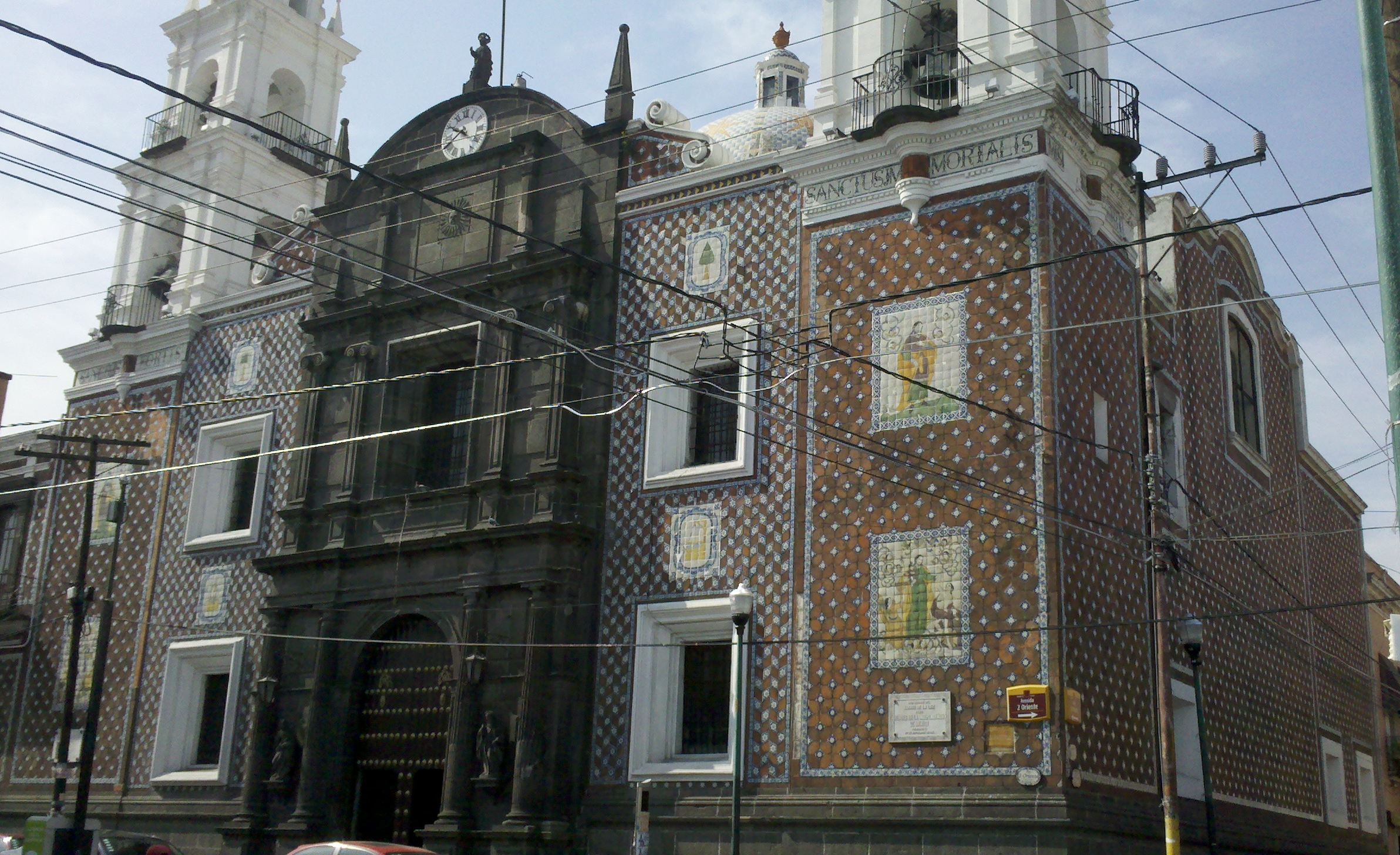 Templo de Nuestra Señora de la Luz, Puebla, México. 2 oriente 1403.